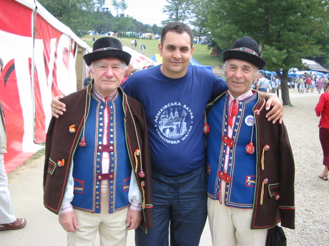 Lemkó népcsoporthoz tartozó férfiak, Zdynia (Lengyelország)